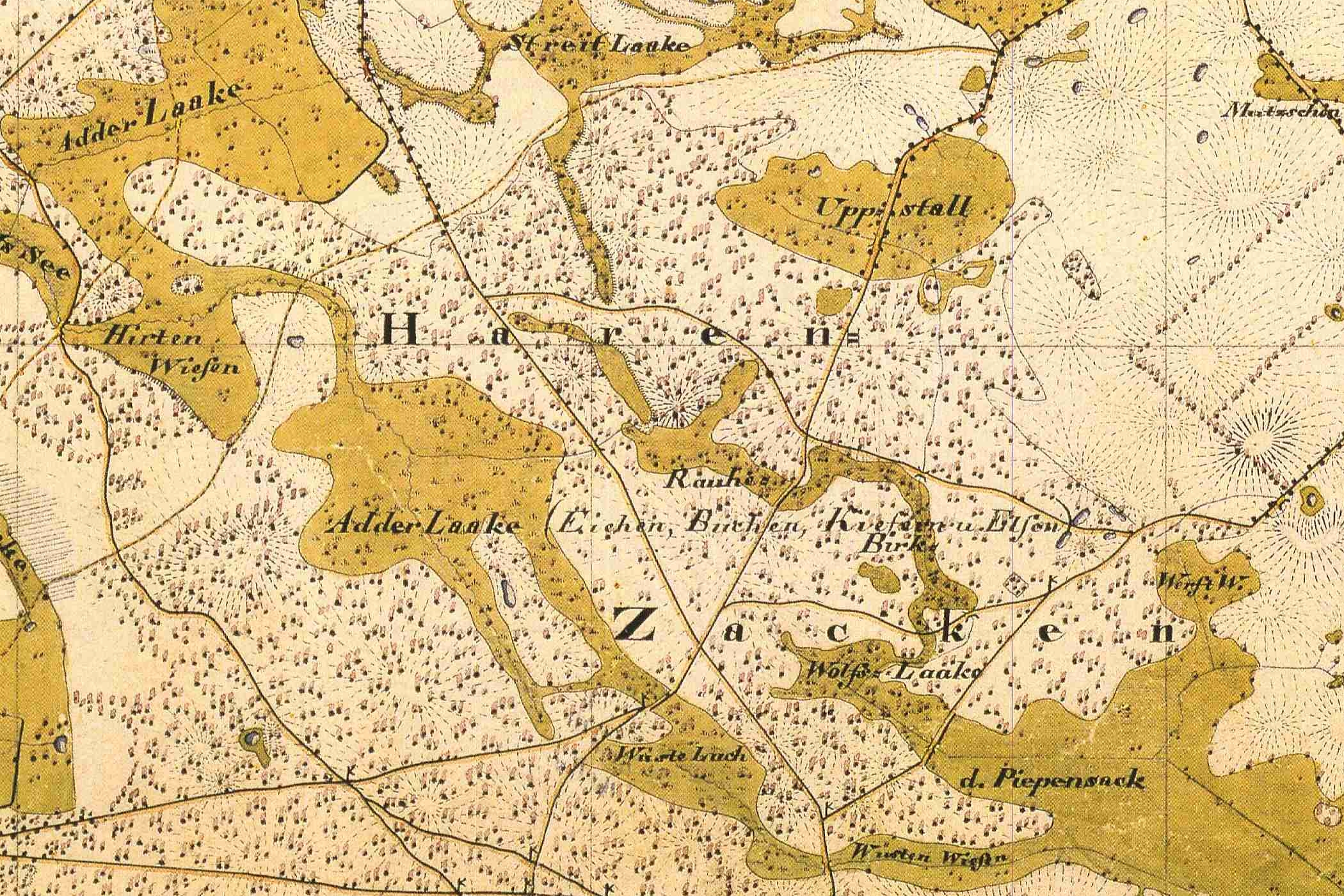 Karte des Waldgebiets Harenzacken bei Hoppenrade, Kreis Ruppin, Provinz Brandenburg, 1825